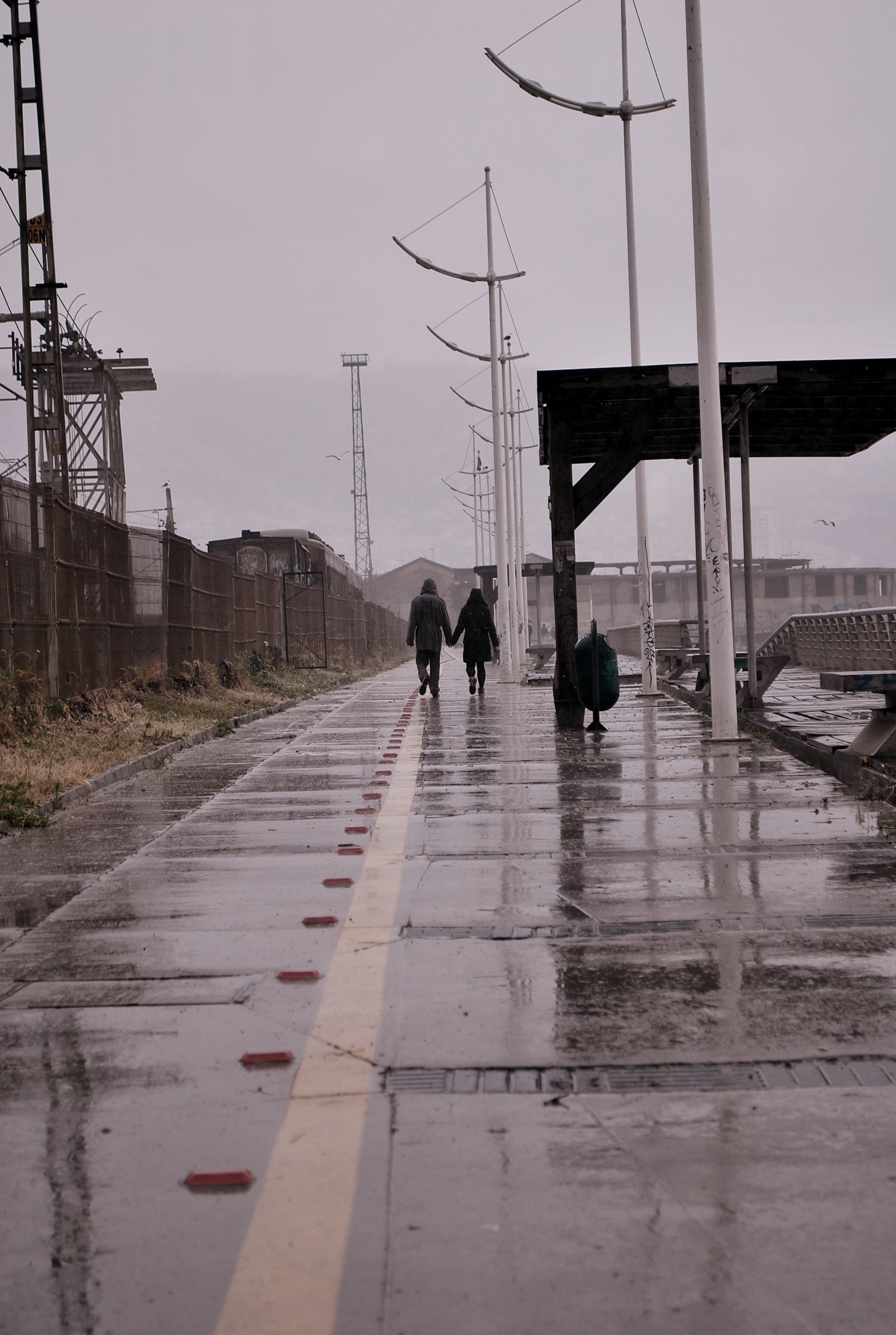 Cuando la lluvia intenta convencernos de quedarnos en casa, algunos preferimos salir y disfrutar del agua junto a los pocos.